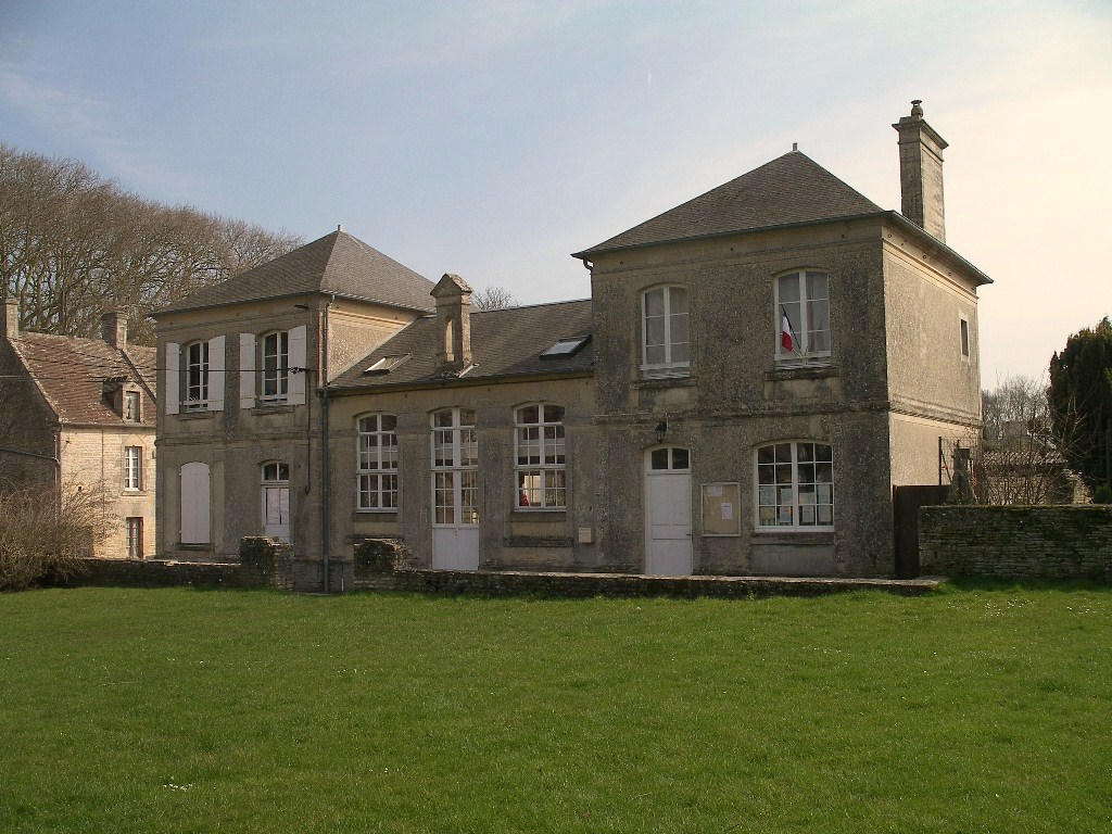 Mairie de Banville (Calvados)